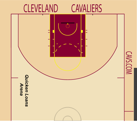 キャブスホームコート配色